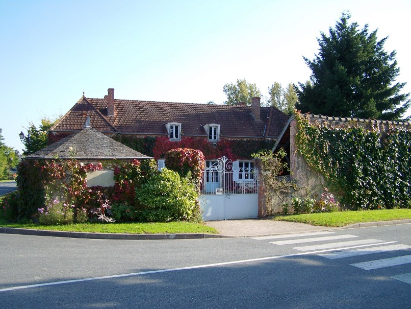 Il s'agit de la maison-école où vécut Alain-Fournier, fils d'instituteurs à Epineuil-le-Fleuriel de 1892 à 1898. Aujourd'hui, le bâtiment a été transformé en musée.